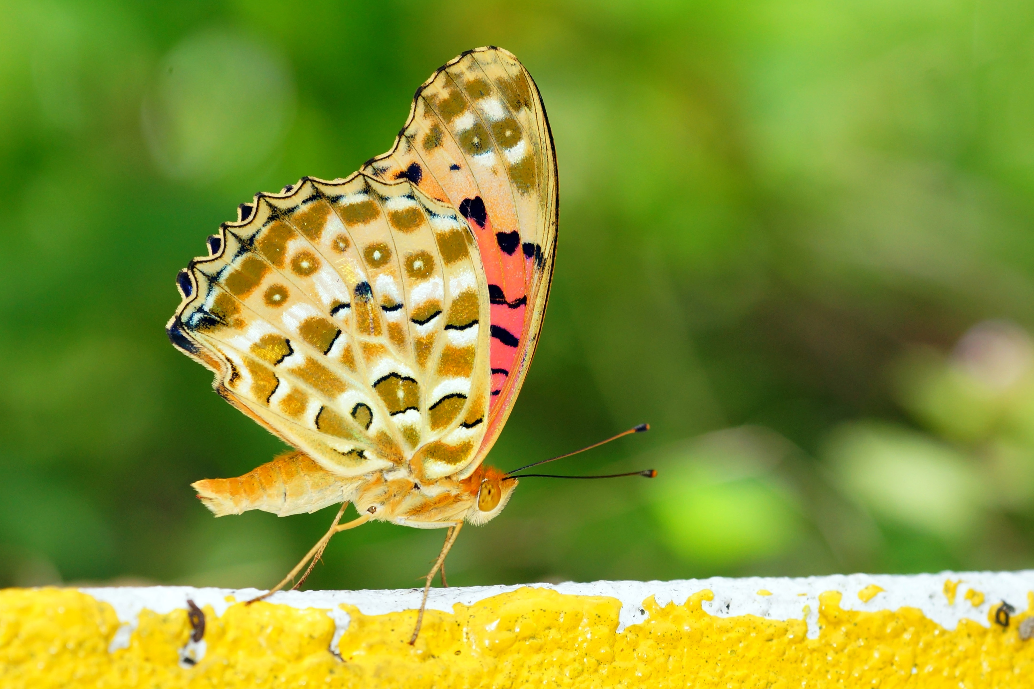 中文（台灣）: 斐豹蛺蝶 Argynnis hyperbius